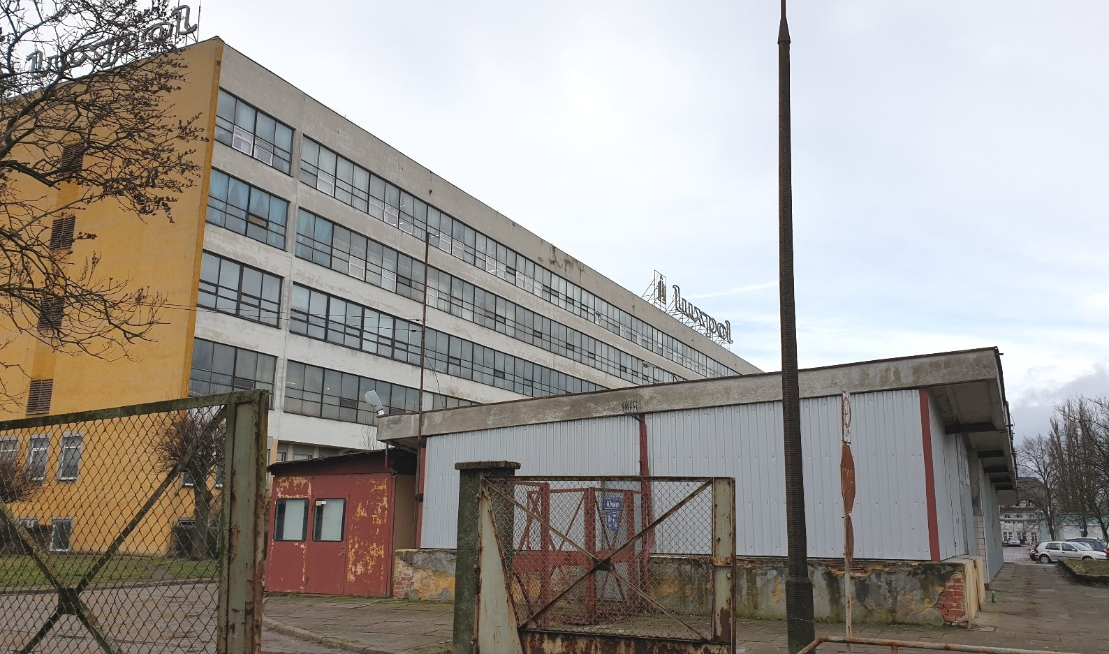 Stargard. Były ZDZ Luxpol.